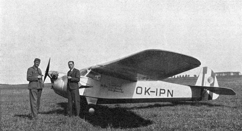 Kpt. V. Fuksa a inž. Havránek z Aeroklubu RČS překonali dne 21. června 1936 na letadle Praga Baby E 114 s motorem Praga 36 ks. mezinárodní dálkový rekord v kategorii lehkých sportovních letadel do váhy 280 kg, který dosud drželi Italové (886 km). Prolétli trať Cheb-Vilno, měřící 2011 km. Jejich výkon byl předložen ke schválení sportovní komisi ARČs a FAI, aby byl uznán za mezinárodní rekord.